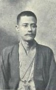 浜口吉兵衛（1868-1940）。和歌山県平民浜口熊岳の三男。利根織物、第一生命保険、豊国銀行重役を経て銚子醤油（のちのヒゲタ醤油）初代社長、1920年より衆議院議員を2期務め、銚子港整備に尽力した。兄に九代目浜口吉右衛門